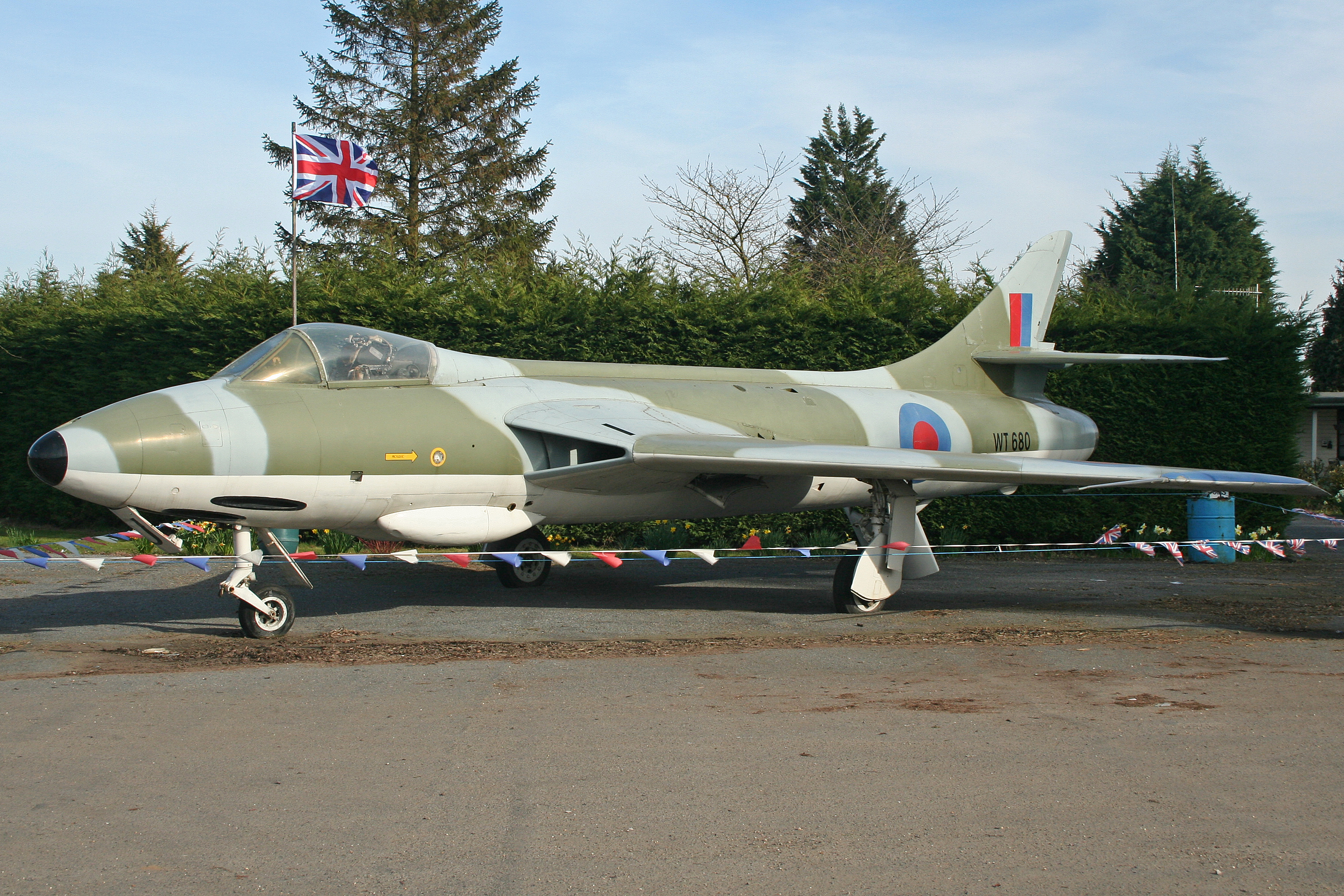 msn 41H-665497. Fleet Hargate. 25-3-2012